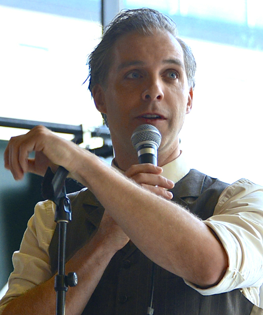 Fredrik Meyer under öppet hus på Kulturhuset Stadsteatern i Stockholm i samband med 40-årsfirandet den 29 november 2014.